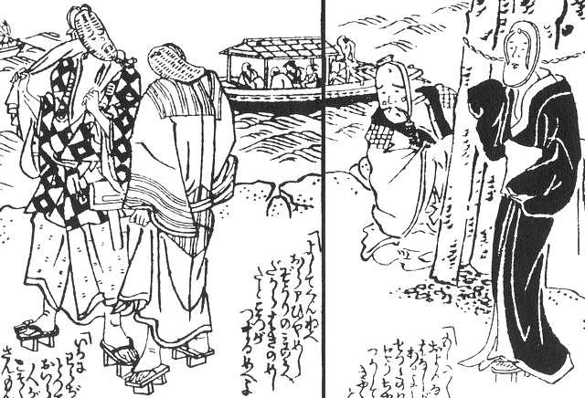 Kibyōshi "Unshidai Izumoengumi" (黄表紙『運次第出雲縁組』)